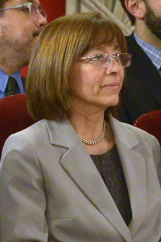 19 Octubre 2016, Ministro Marcelo Díaz participa en cambio de gabinete, luego realiza conferencia de prensa.